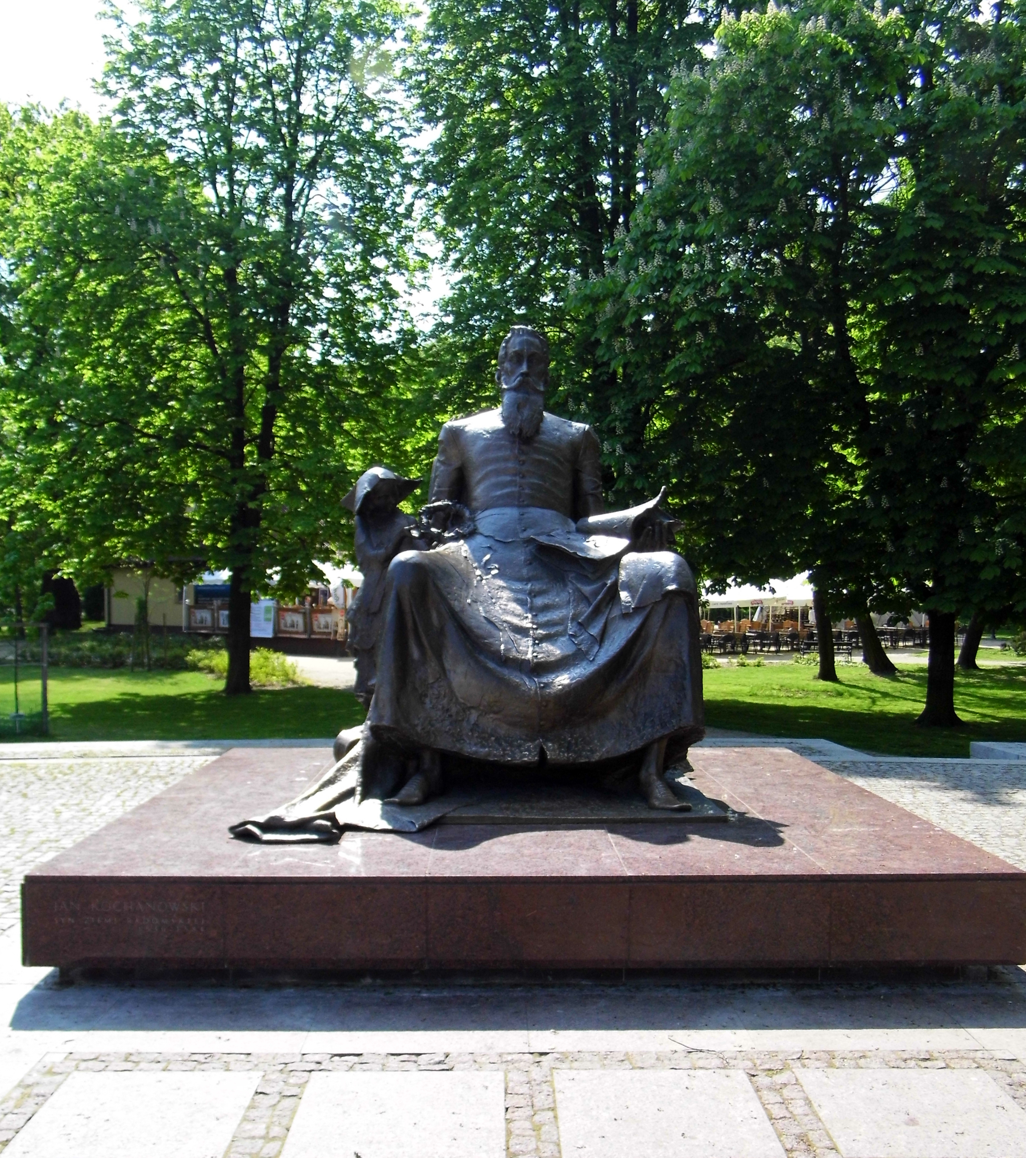 Radom